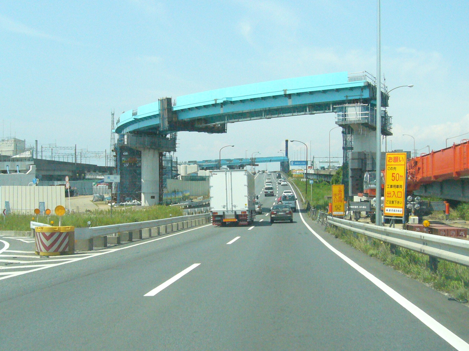 ichikawa-JCT-higashi-kanto-expressway-japan